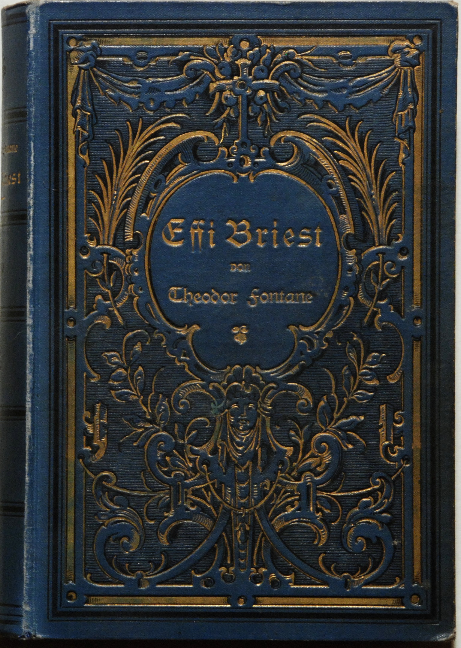 Theodor Fontane: Effi Briest. Original-Einband der ersten Buchausgabe 1896